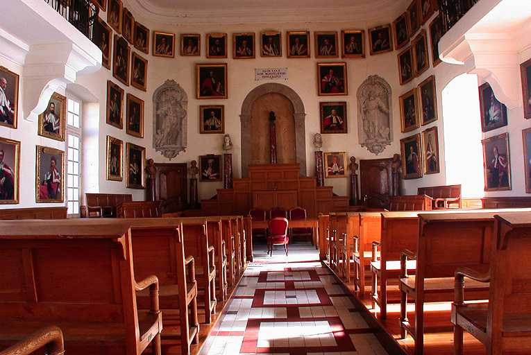 La salle des actes de Médecine à Montpellier Photographie personnelle